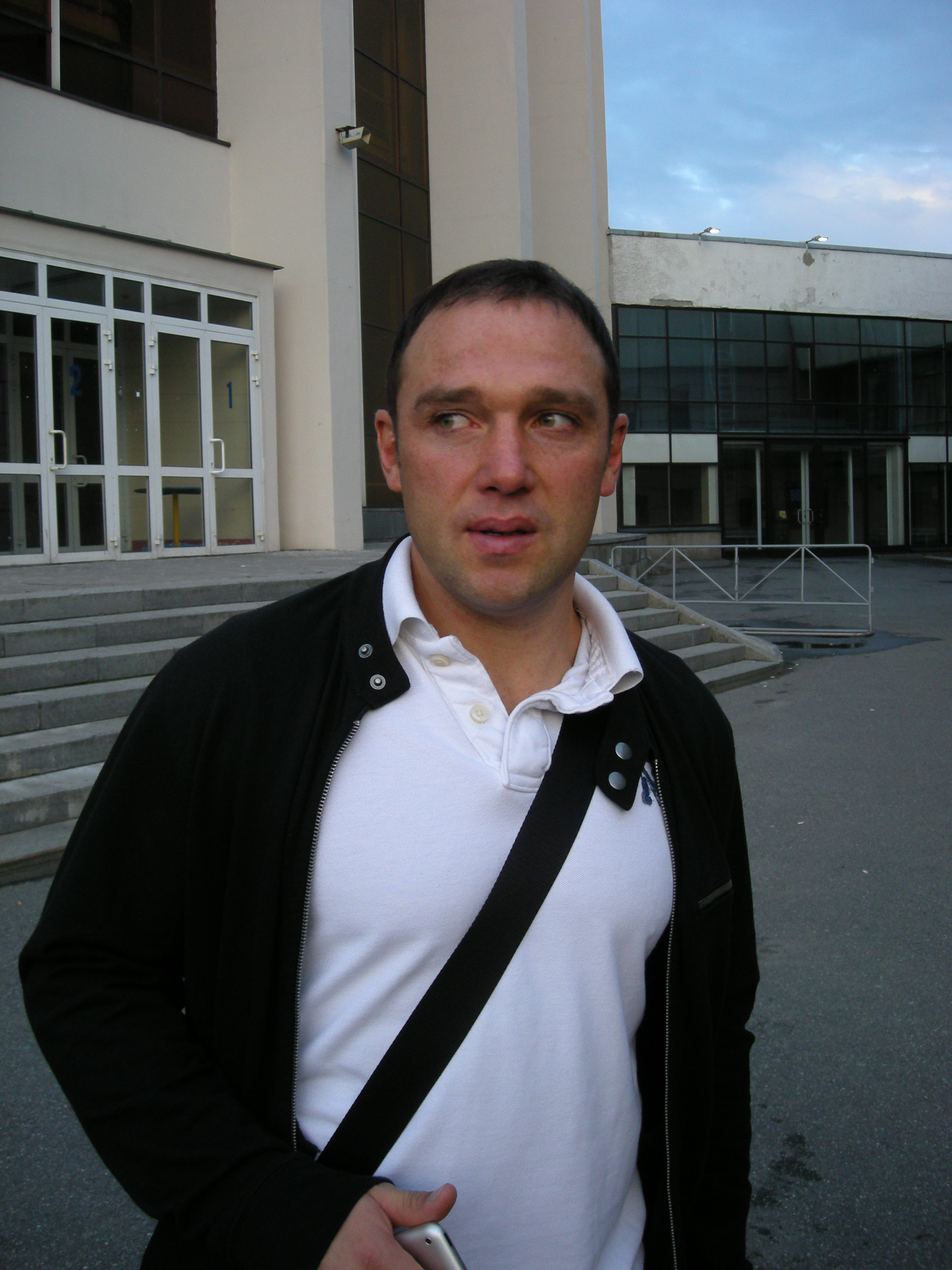 Sergei Krivokrasov(Russian: Сергей Владимирович Кривокрасов ) (born April 15, 1974 in Angarsk, U.S.S.R.) is a Russian ice hockey forward.